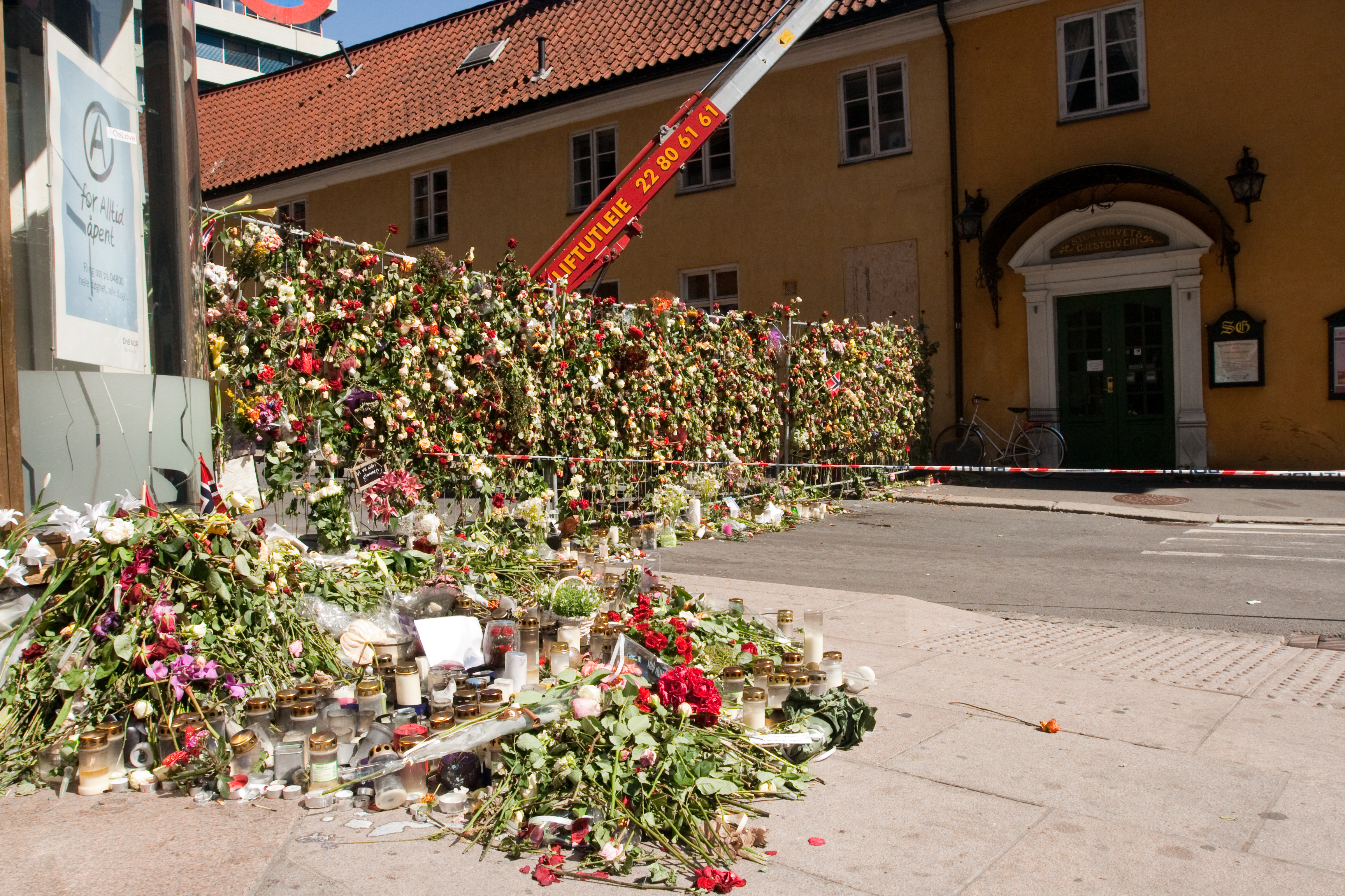 Blomstervegg i Grubbegata